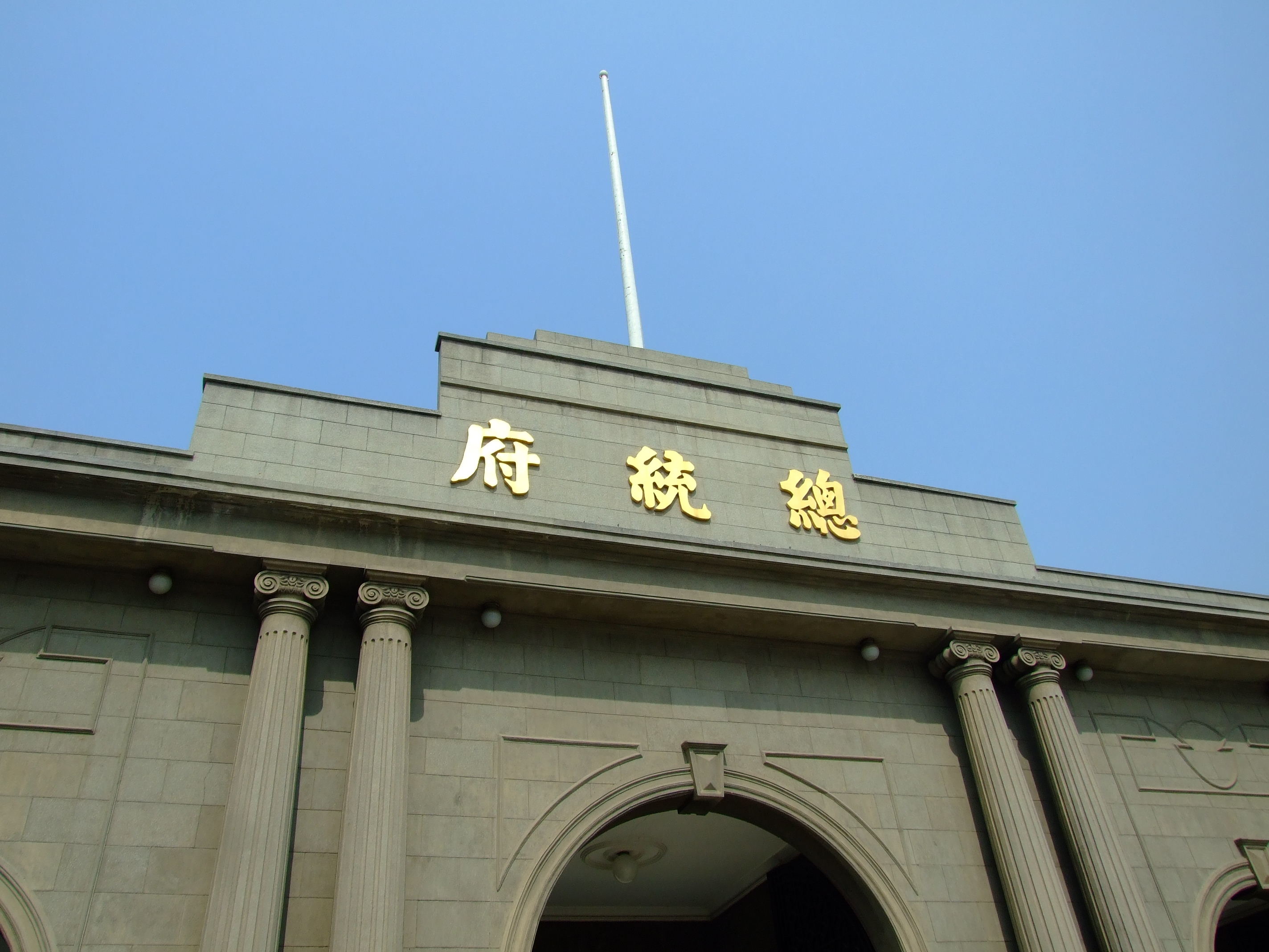 中文（中国大陆）: 蓝天下的南京总统府Bân-lâm-gú: Nâ-thinn hā ê Lâm-kiann Tsóng-thóng-hú